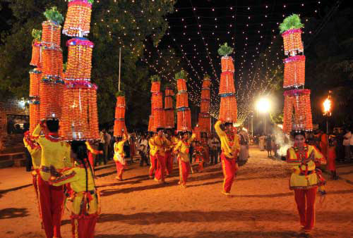 Kataragama Esala Festival